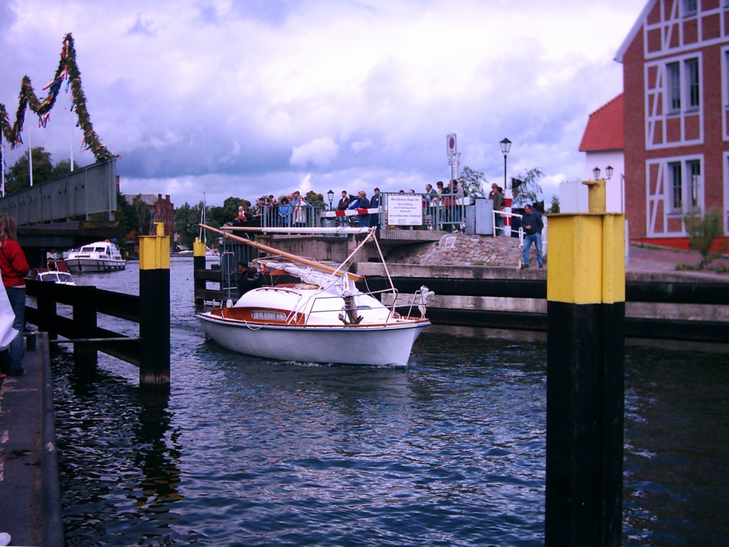 Drehbrücke in Malchow, Durchfahrt Segelboot